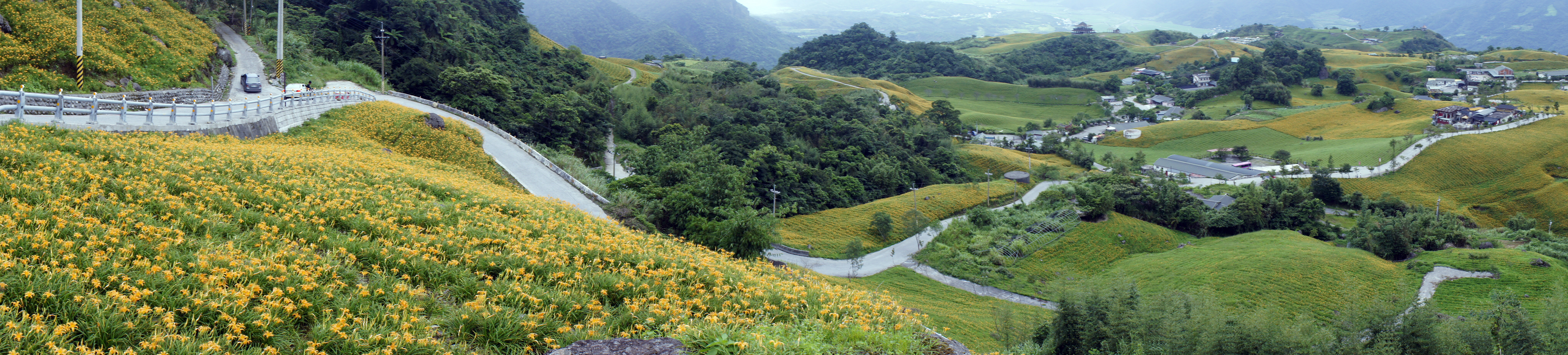 花蓮六十石山